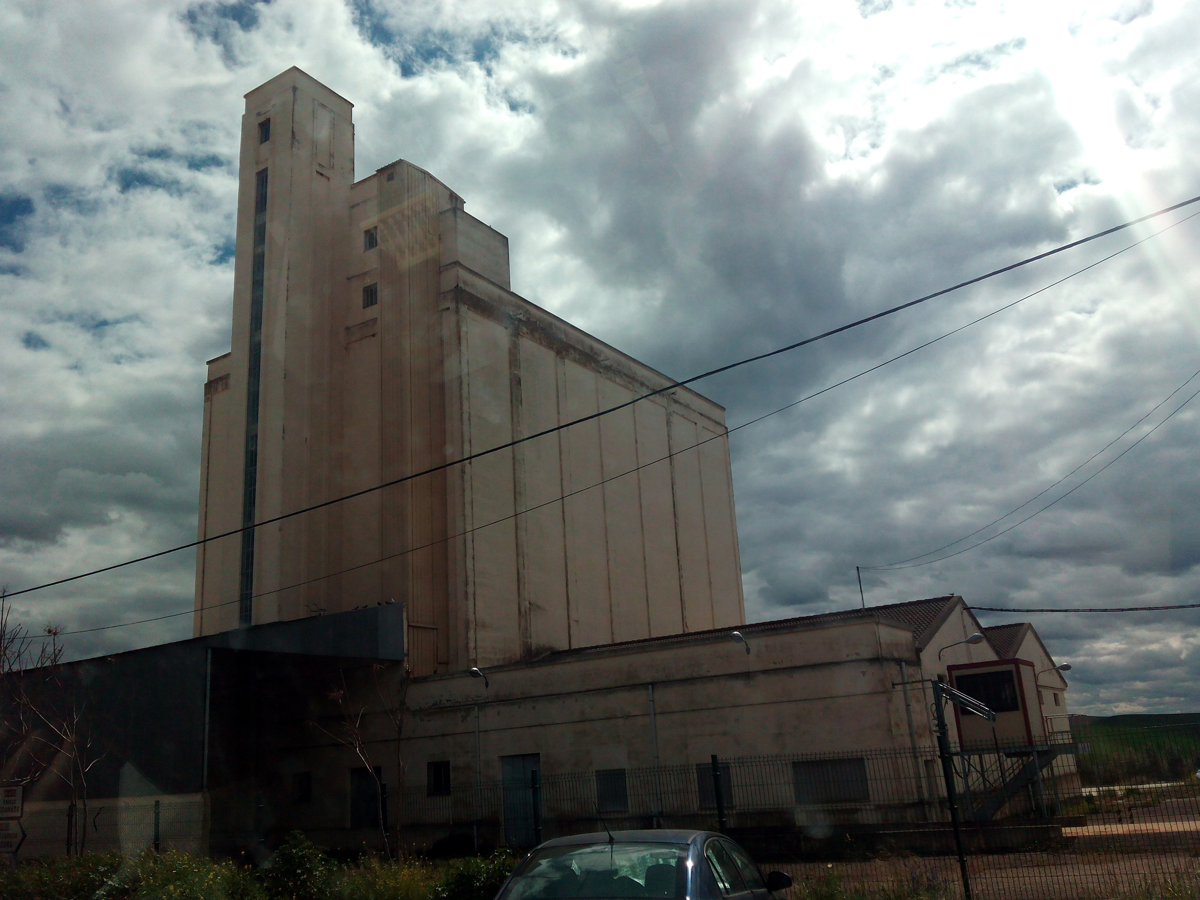 Silo de Santa Cruz, Córdoba (España).